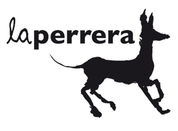 Logo del Laboratorio de Arte Re-activo La Perrera, por Gabriela León.